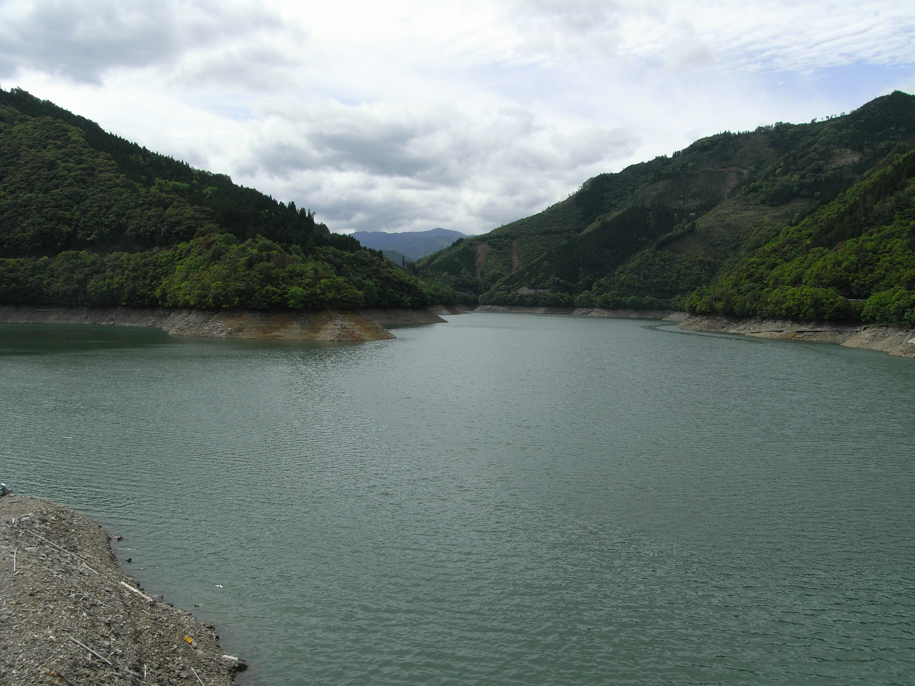 Lake